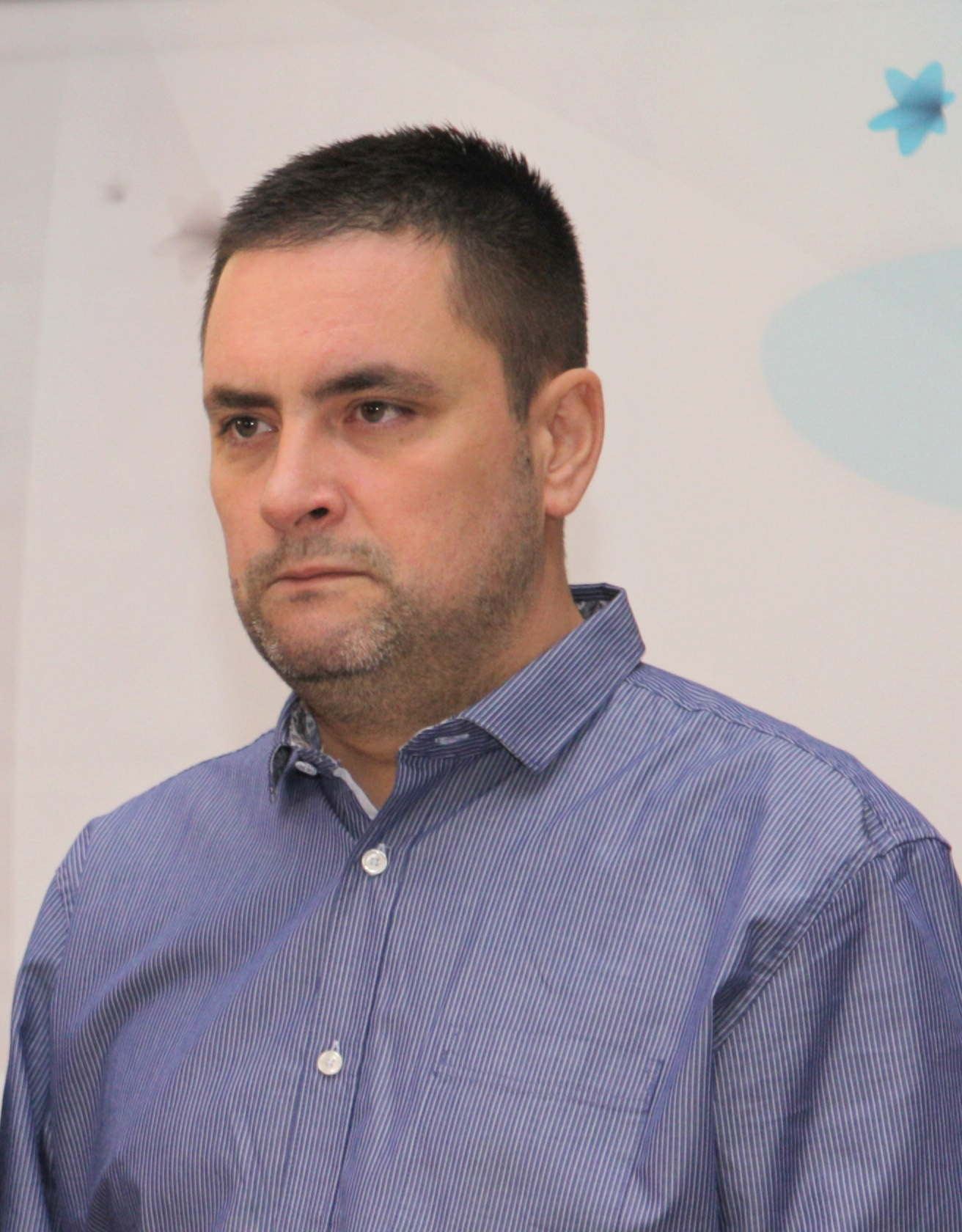 Dimitrije Banjac